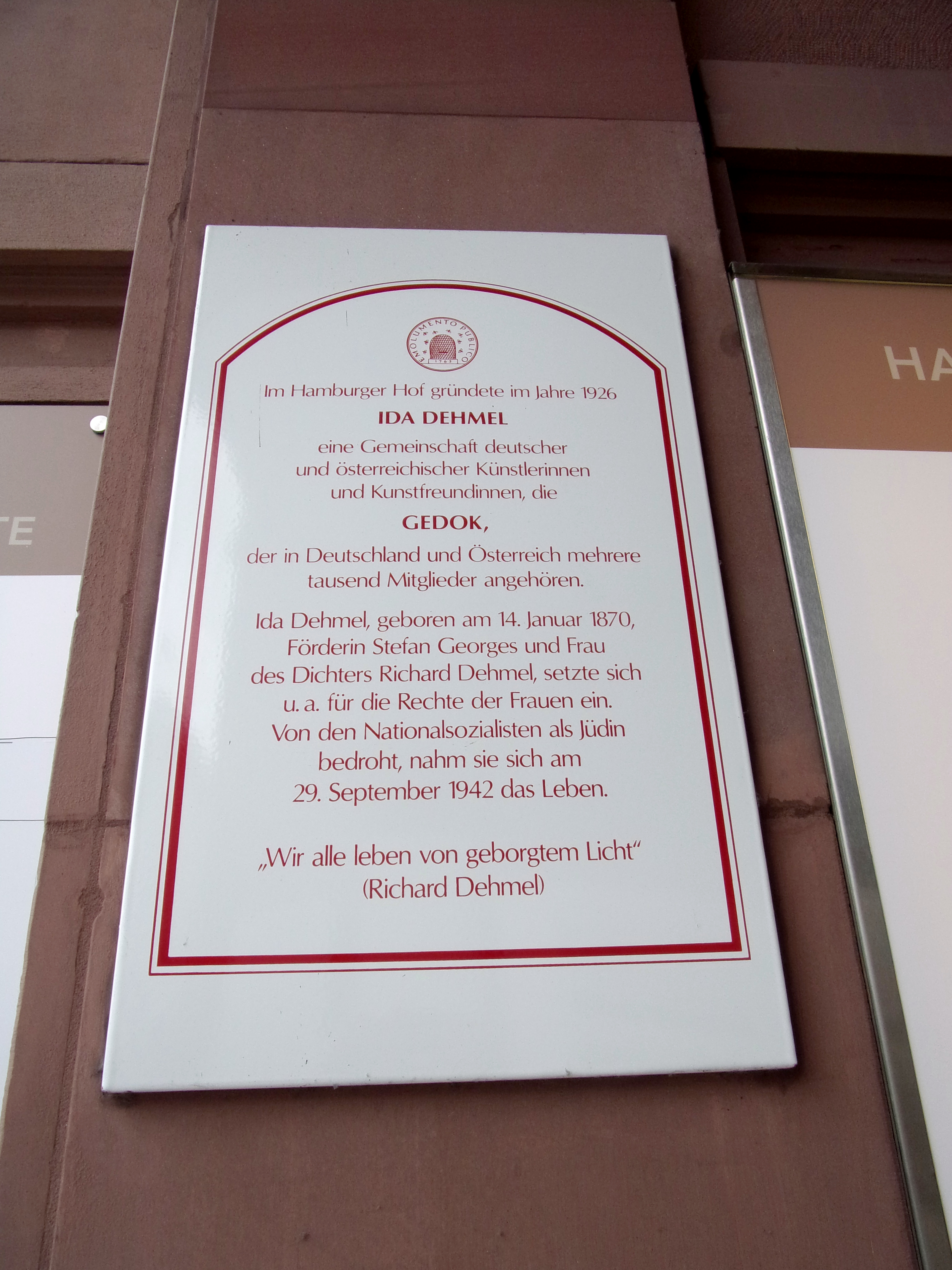 Tafel für Ida Dehmel, Gründerin der GEDOK am Gebäude Hamburger Hof am Jungfernstieg. GEDOK steht für Gemeinschaft deutscher und österreichischer Künstlerinnen und Kunstfreundinnen. Ida Dehmel war verheiratet mit Richard Dehmel. Die GEDOK in Hamburg hat ihren Sitz im Haus für Kunst und Handwerk, Koppel 66 in St. Georg.